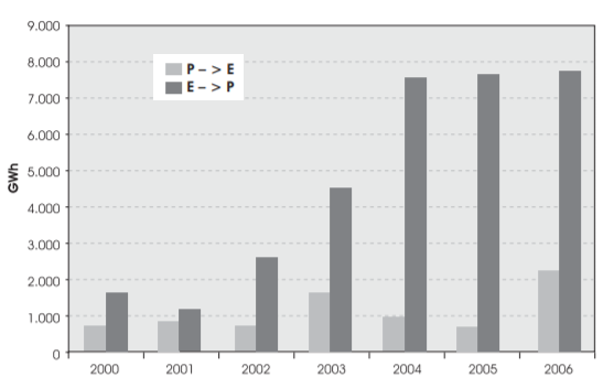 Evolucion del MIBEL